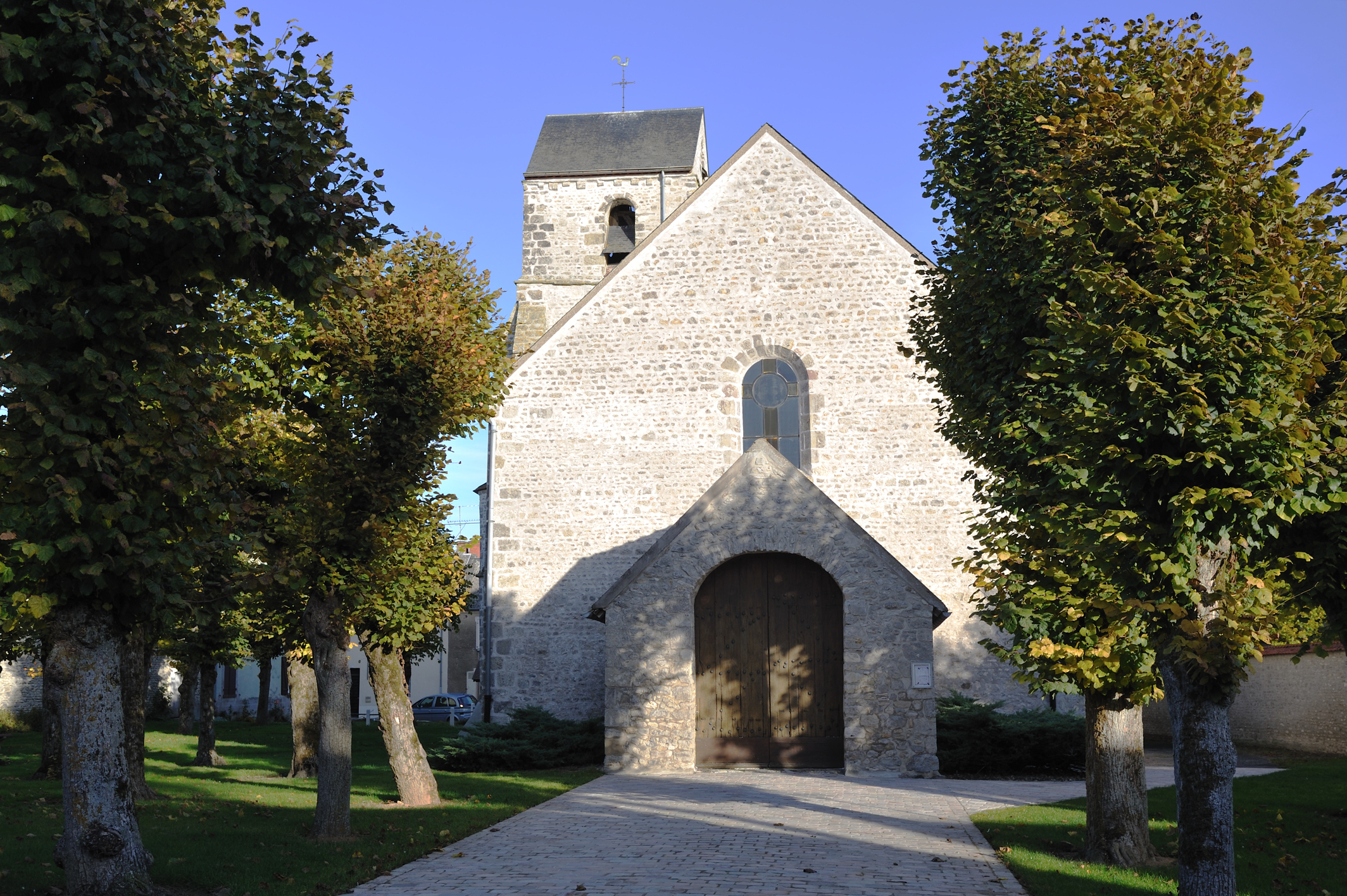 Église Saint-Germain d'Erceville, Loiret, France